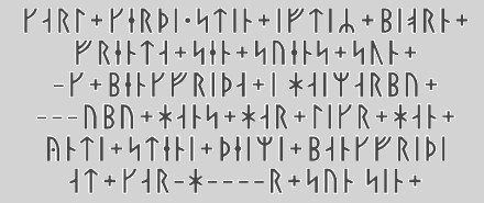 Runskrift på Botkyrkamonumentet Sö 286 utanför Botkyrka kyrka